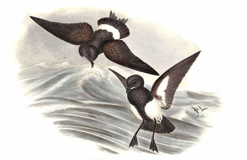 Océanite à ventre noir